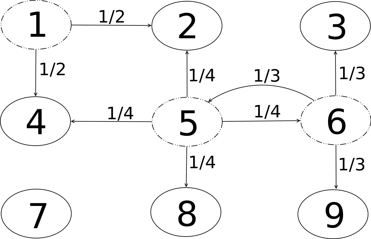 Übergangsgraph einer begrenzten symmetrischen Irrfahrt in zwei Dimensionen. Die Übergangswahrscheinlichkeiten sind vom Zustand abhängig.